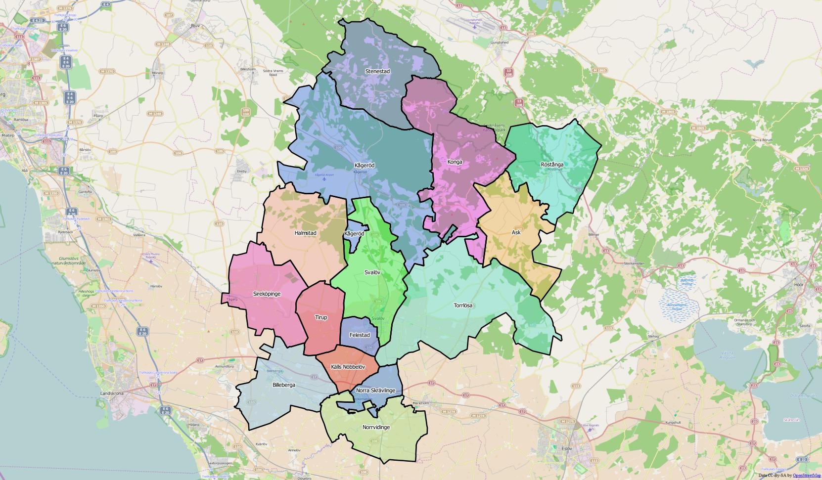 Distriktsindelningen i kommunen.